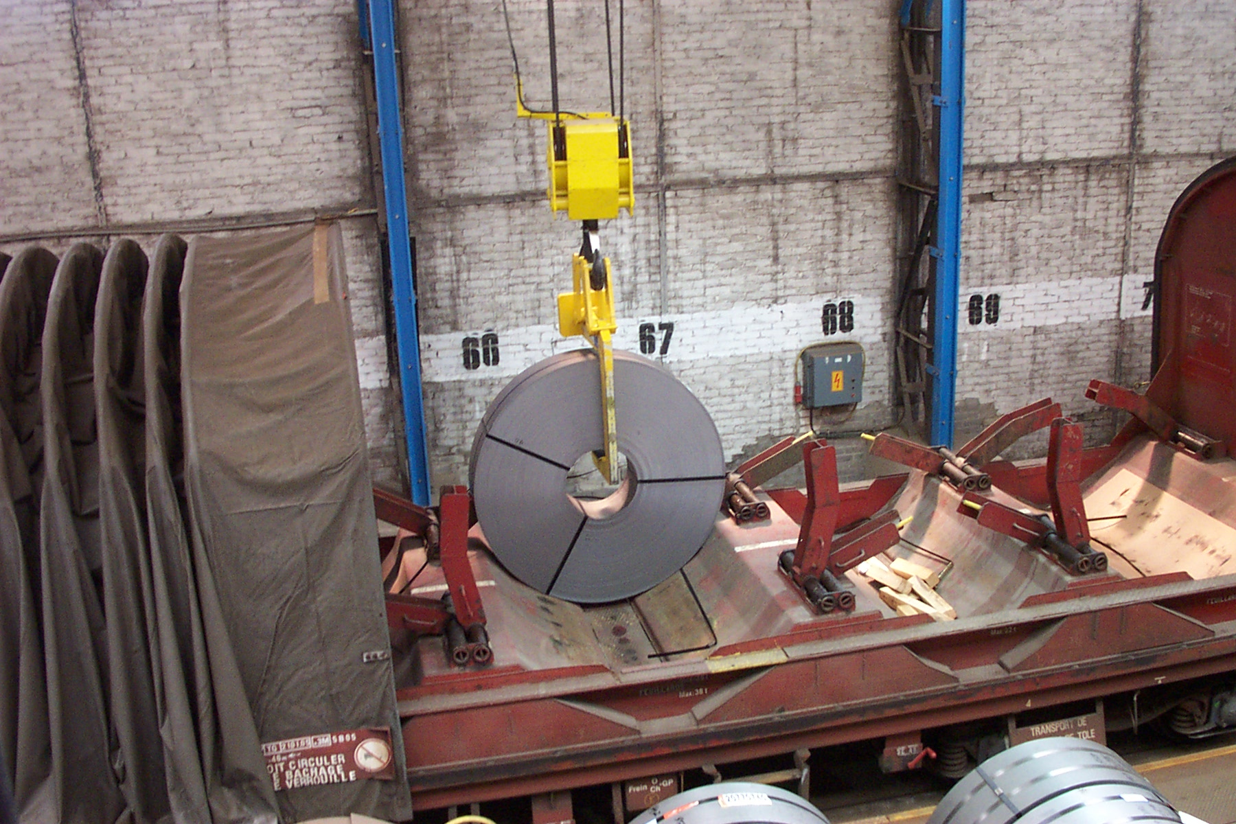 Warmband wird aus Coil-Transportwagen geladen